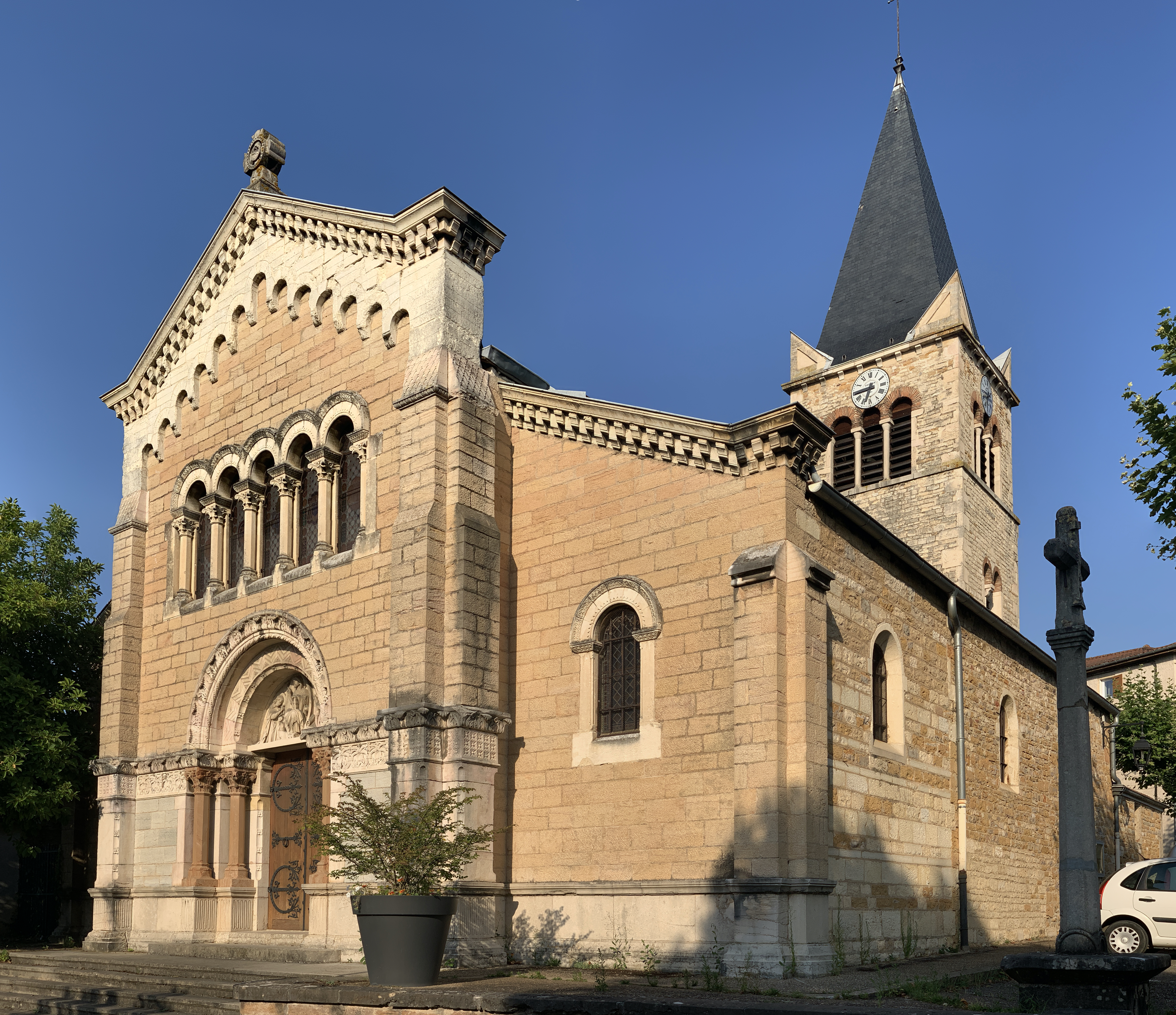 Église Saint-Roch de Parcieux.